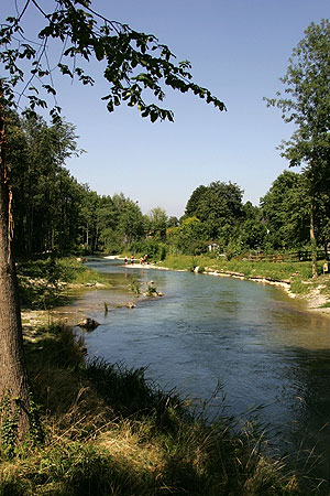 Alte Aare